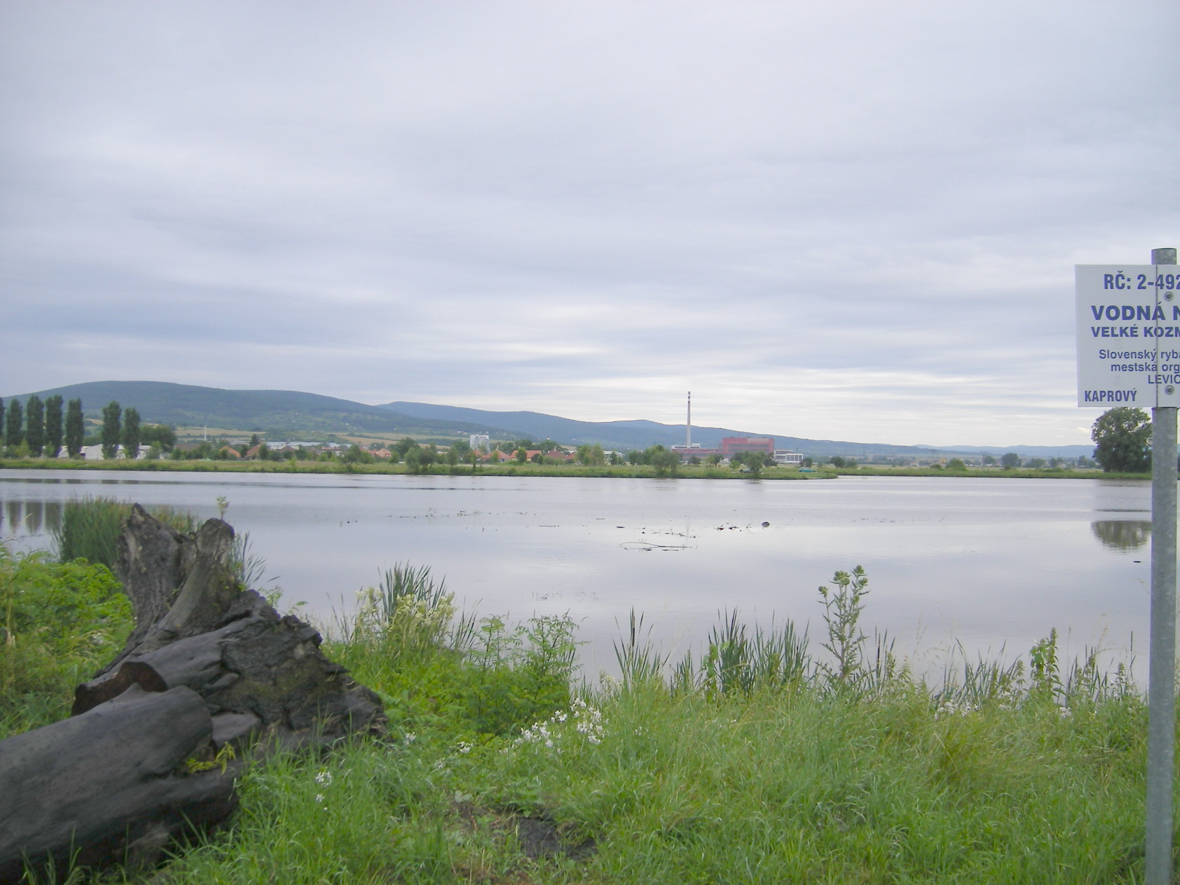 Tlmače (okres Levice) reservoir